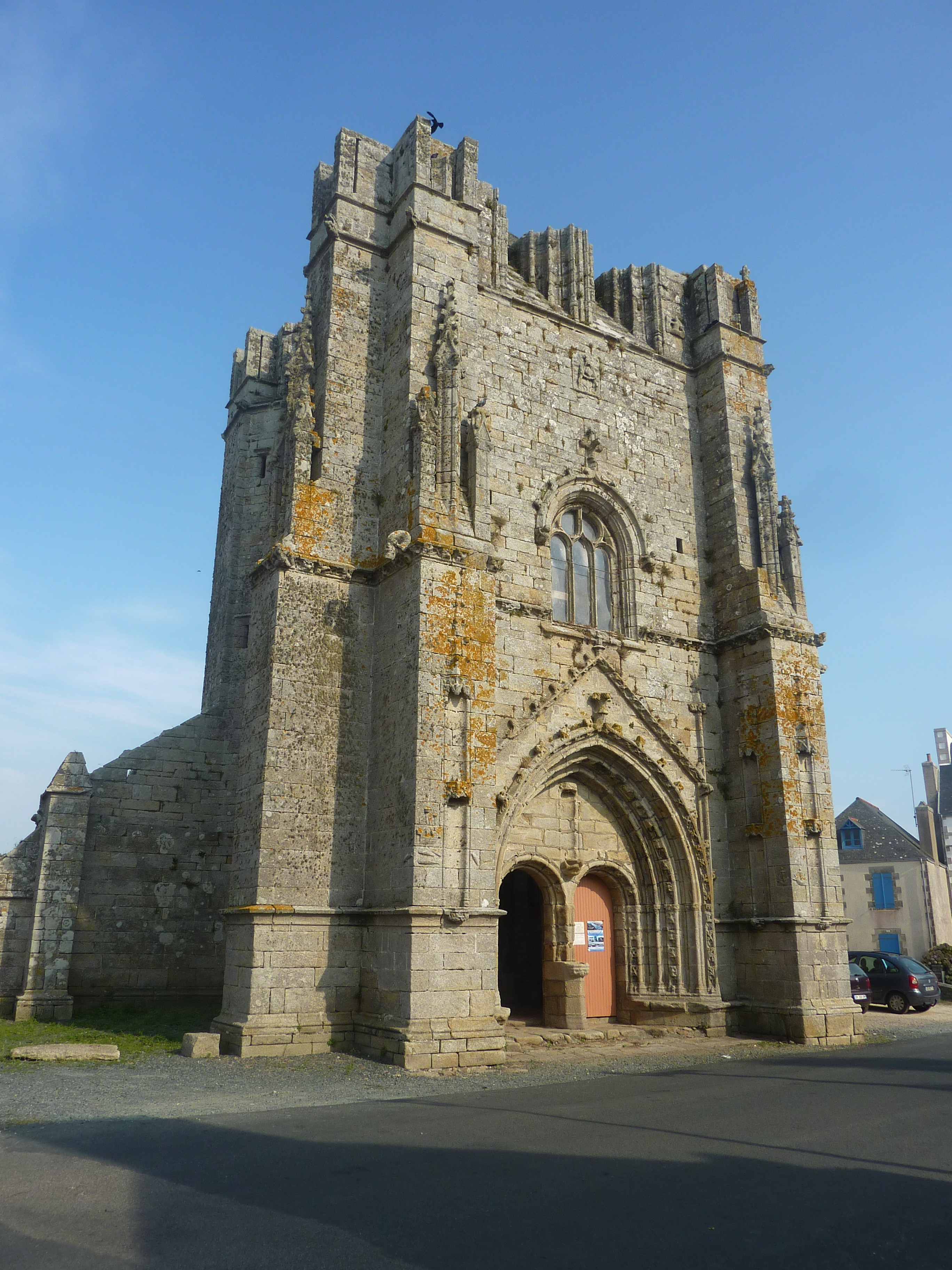 Penmarch : la Tour carrée de Saint-Guénolé